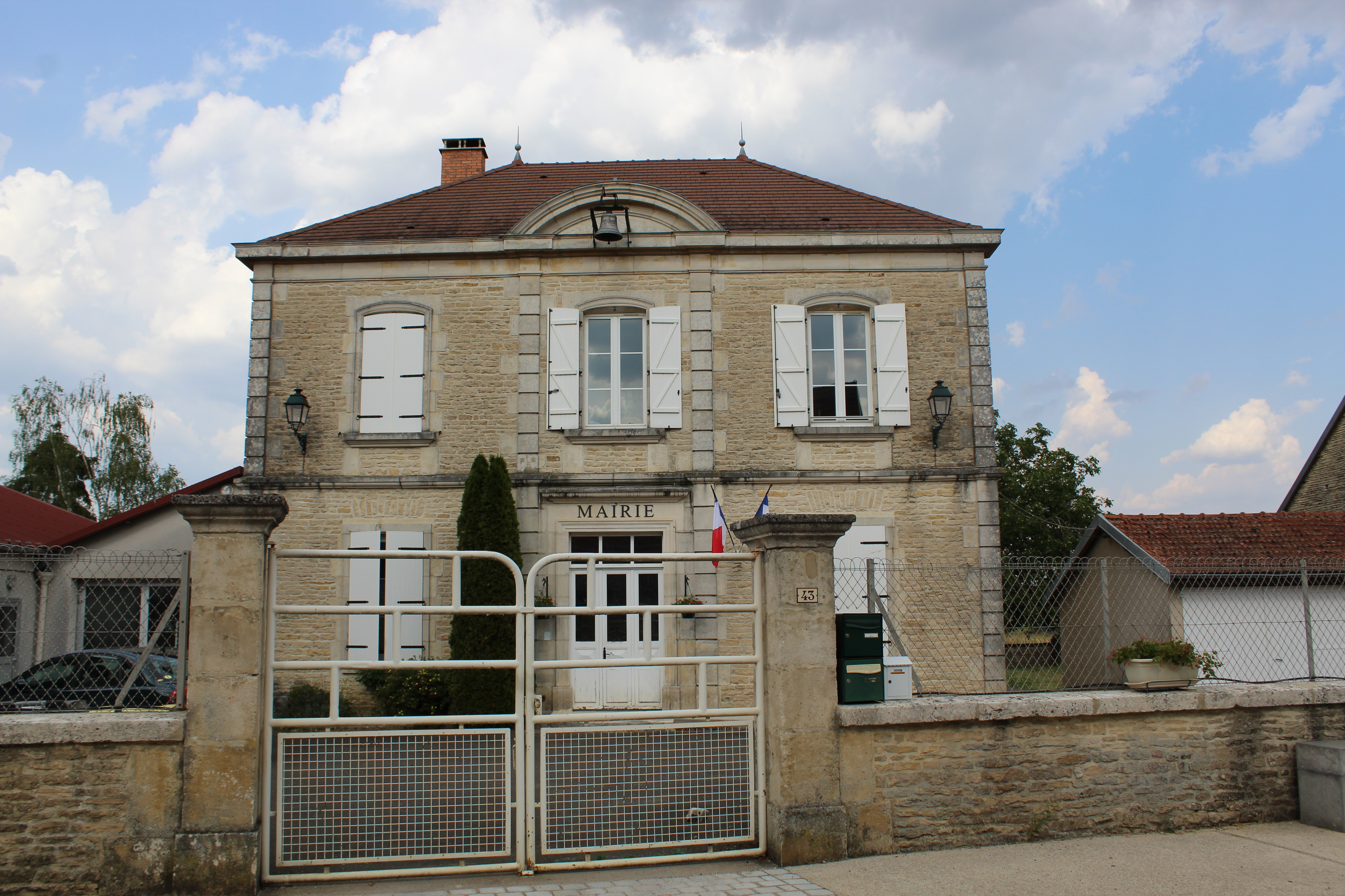 La mairie